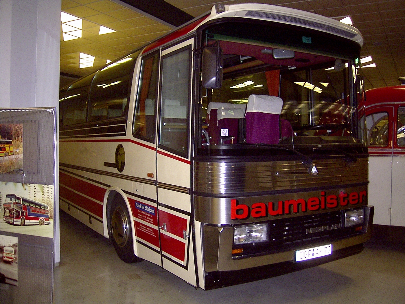 Neoplan, Urtyp des Jetliner im Neoplan-Museum Stuttgart-Möhringen fotografiert von Tilius 5.1.2006